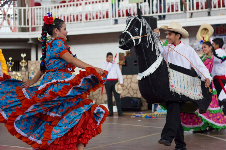 Foto de Proyección Folklórica Bilingüe Honduras tomada en el Gran Pereke 2012. Mientras representaban "Flores de Mime".